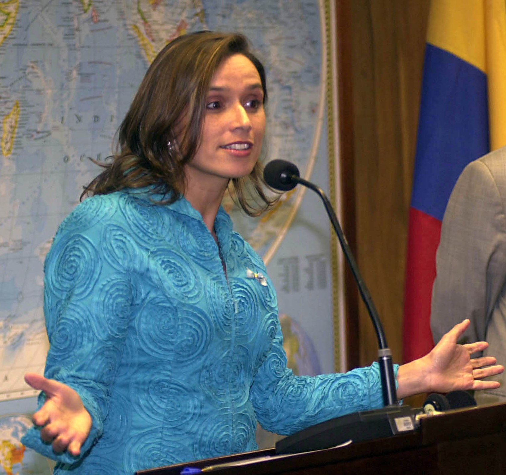 María Consuelo Araujo, ex ministra de relaciones exteriores de Colombia en reunión bilateral con su homologo de Brasil. (Croped)